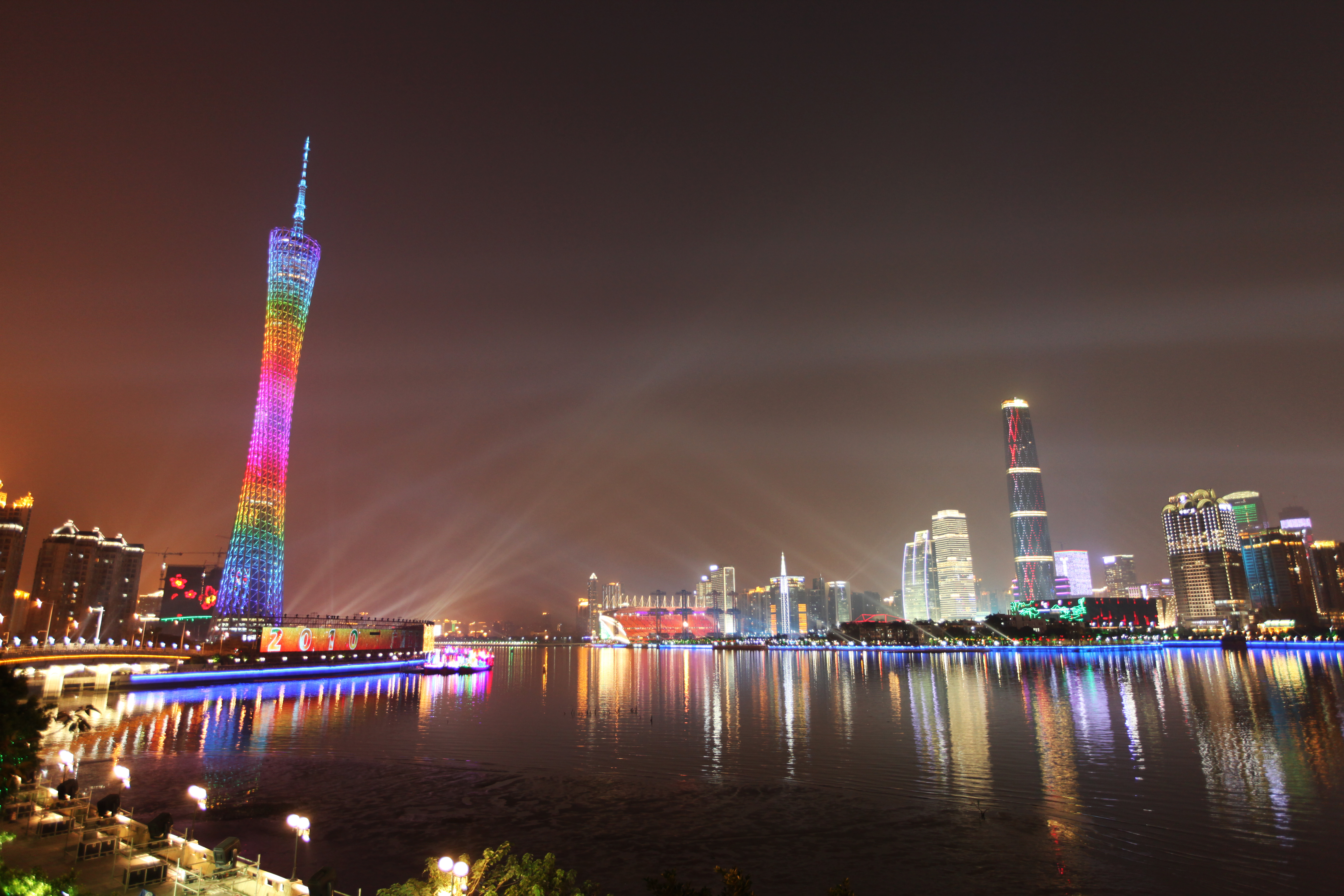 广州